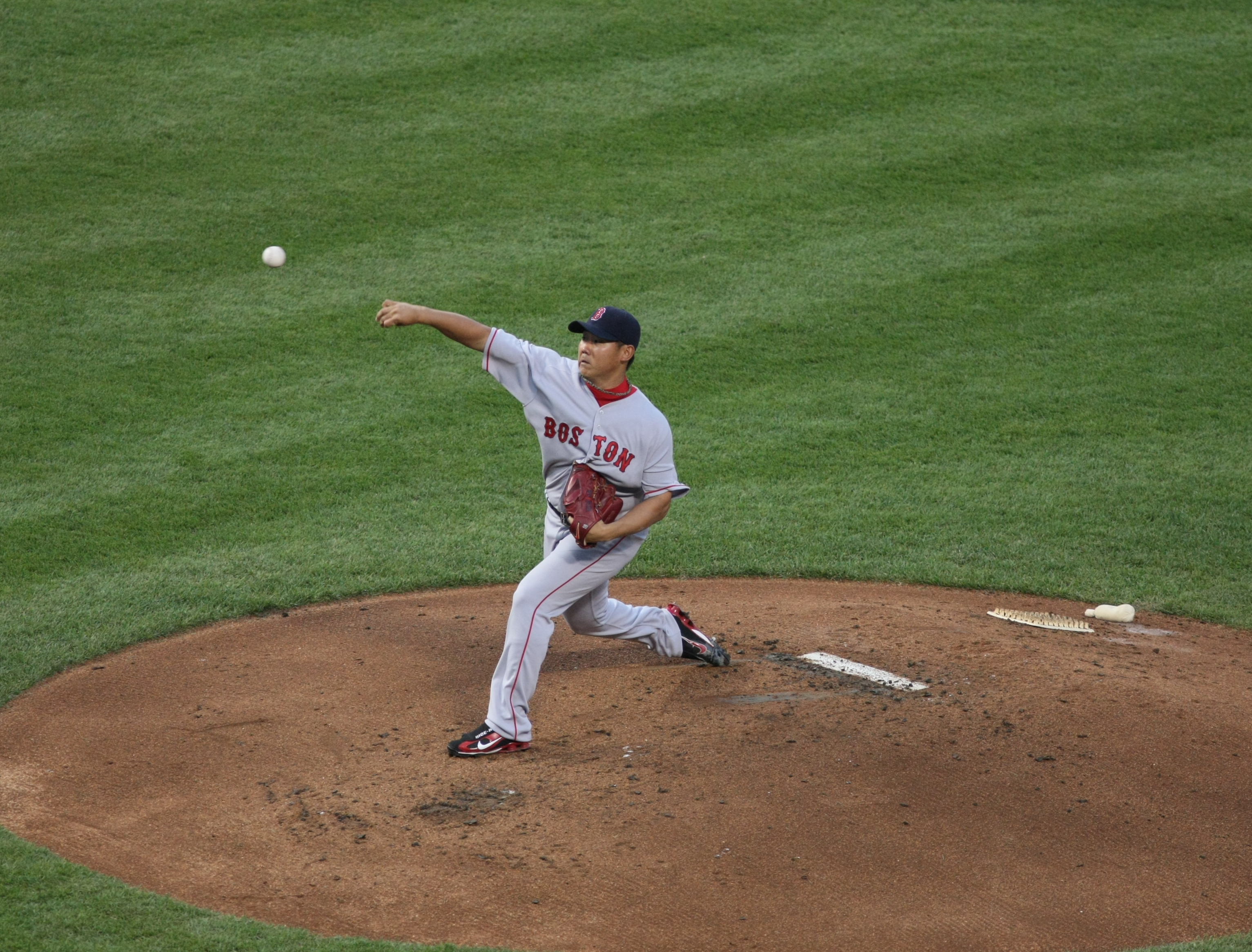 Daisuke Matsuzaka Reprint from Flickr